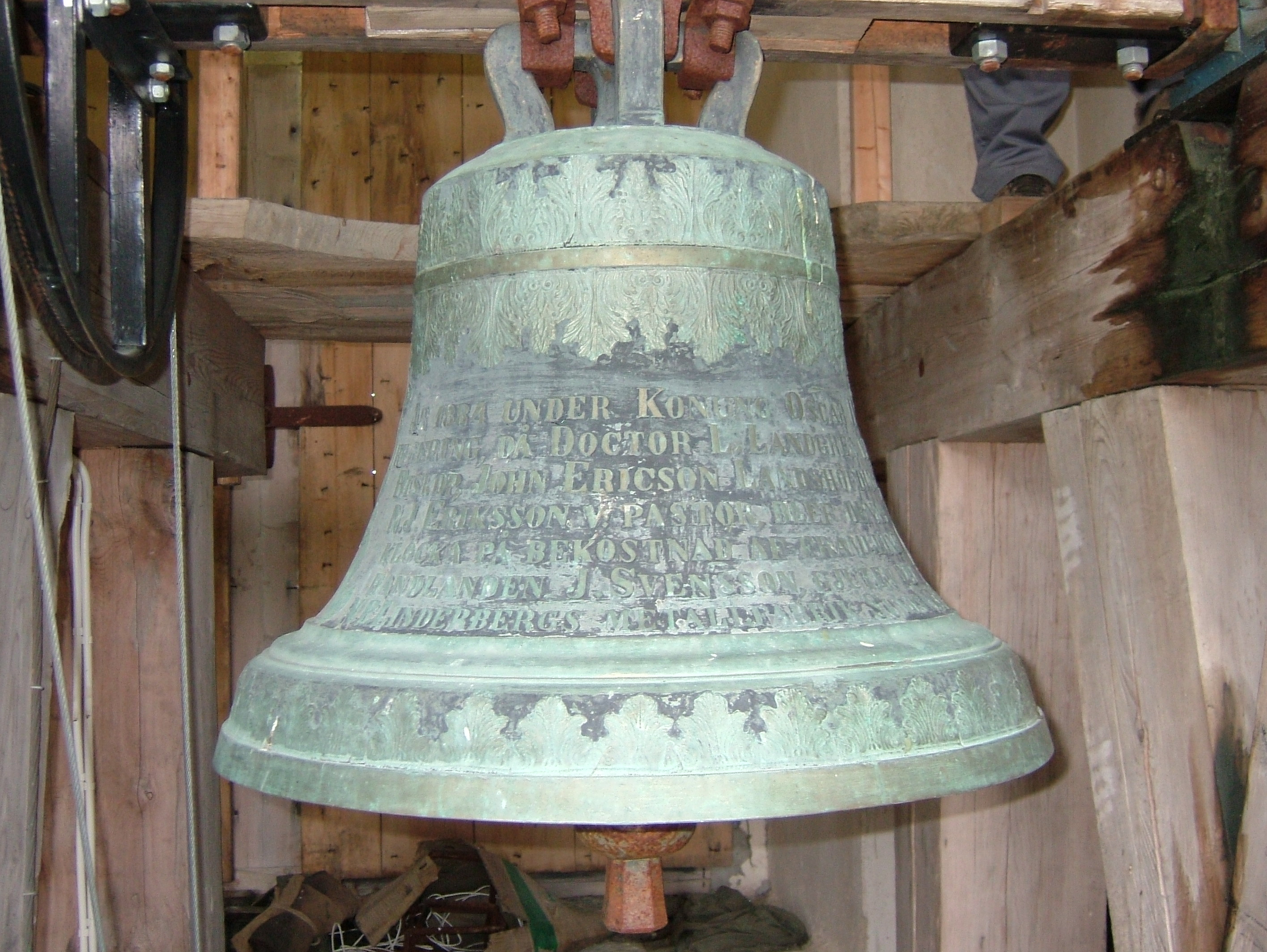 Laxsjö kyrka, main bell